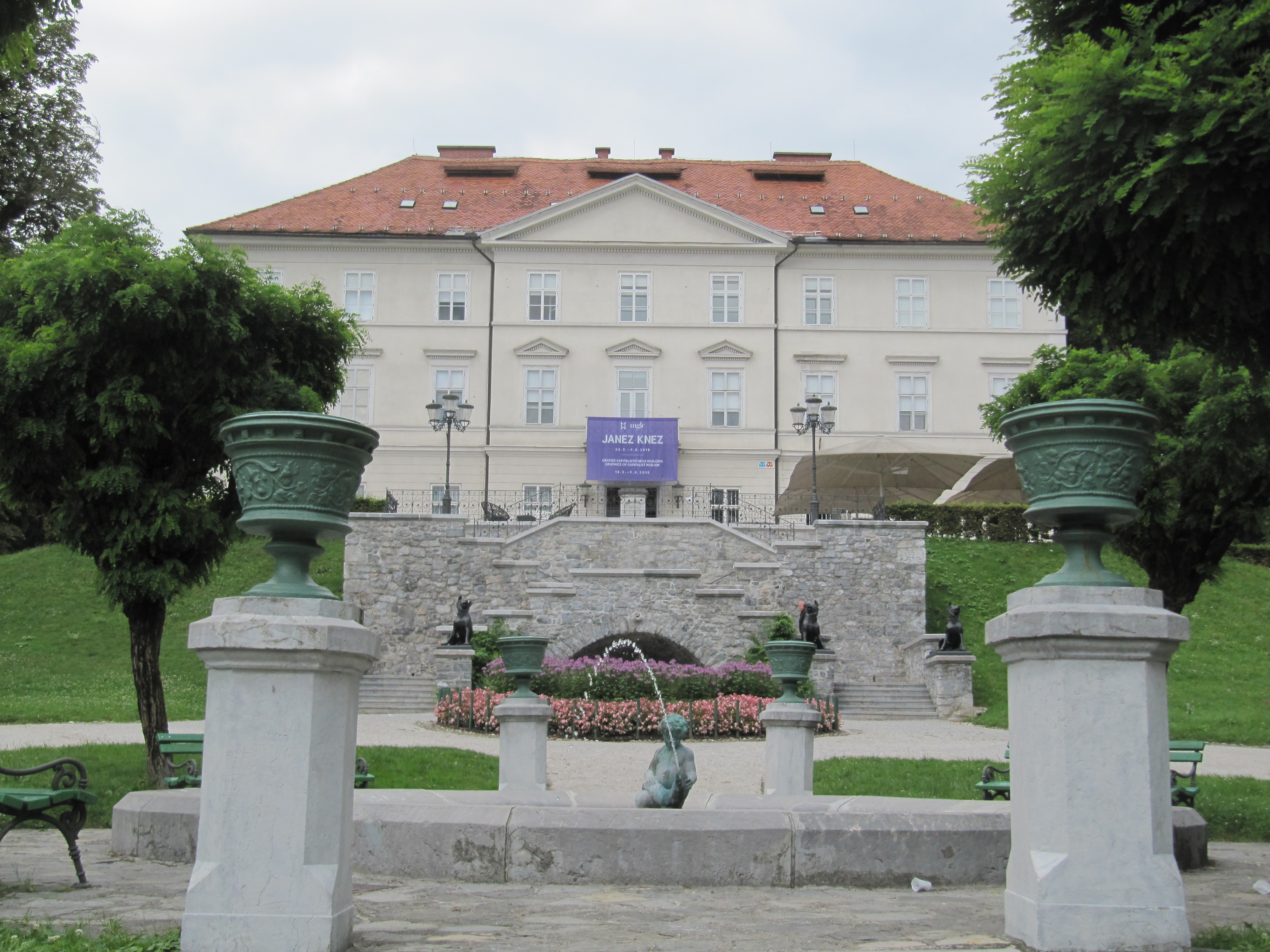 Mednarodni grafični likovni center